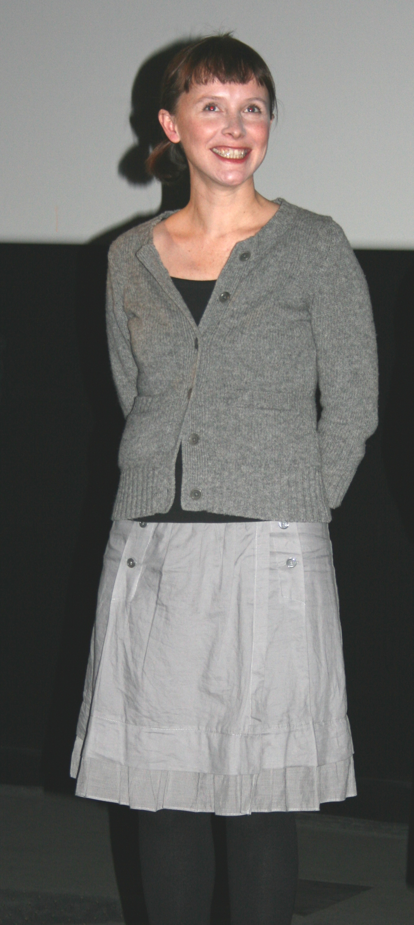 Sandrine Le Berre à l'avant-première de Passe-passe diffusée à l'UGC Ciné Cité Les Halles, à Paris.